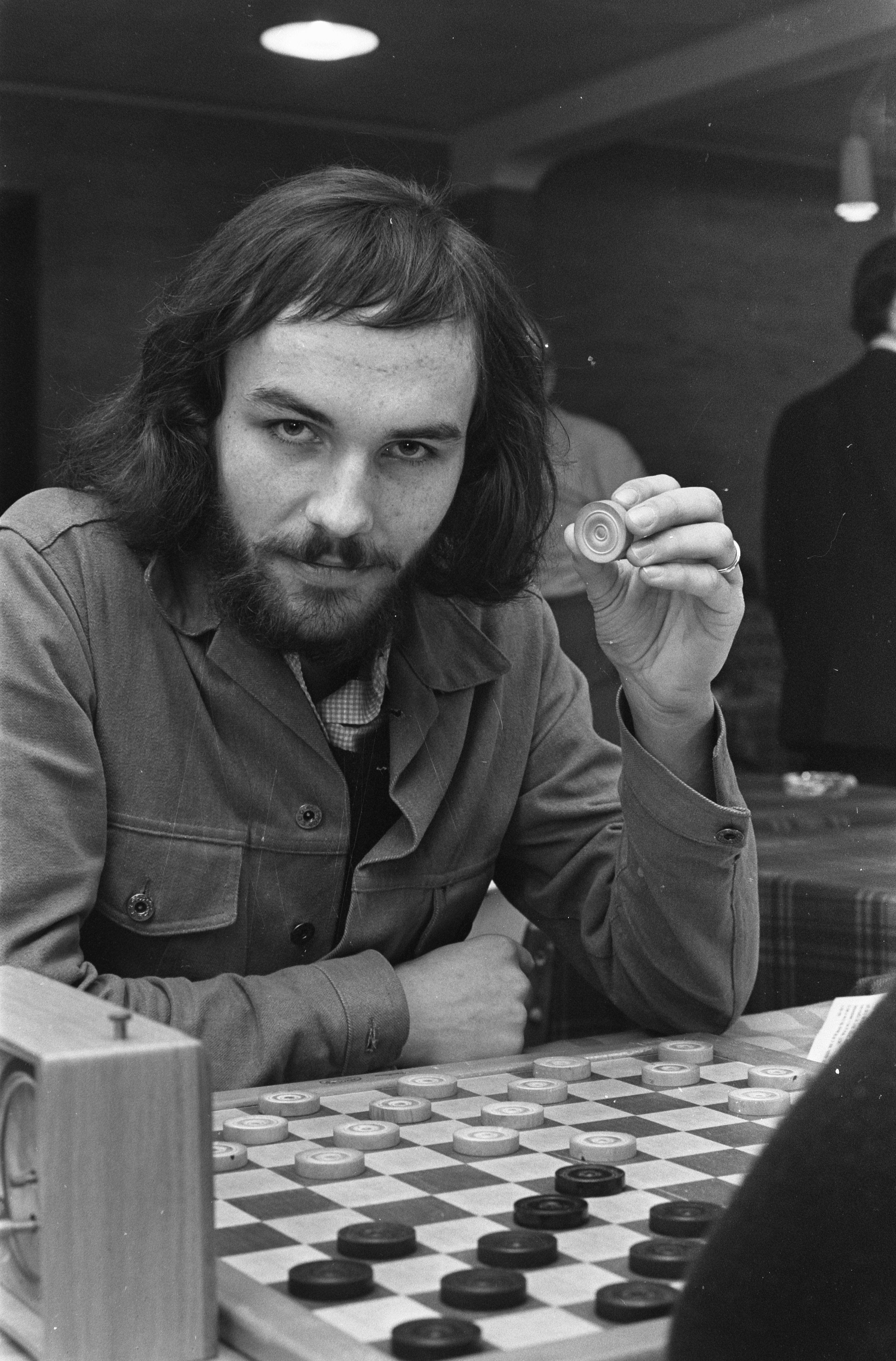 Nederlands damkampioenschap in Amsterdam; Harm Wiersma